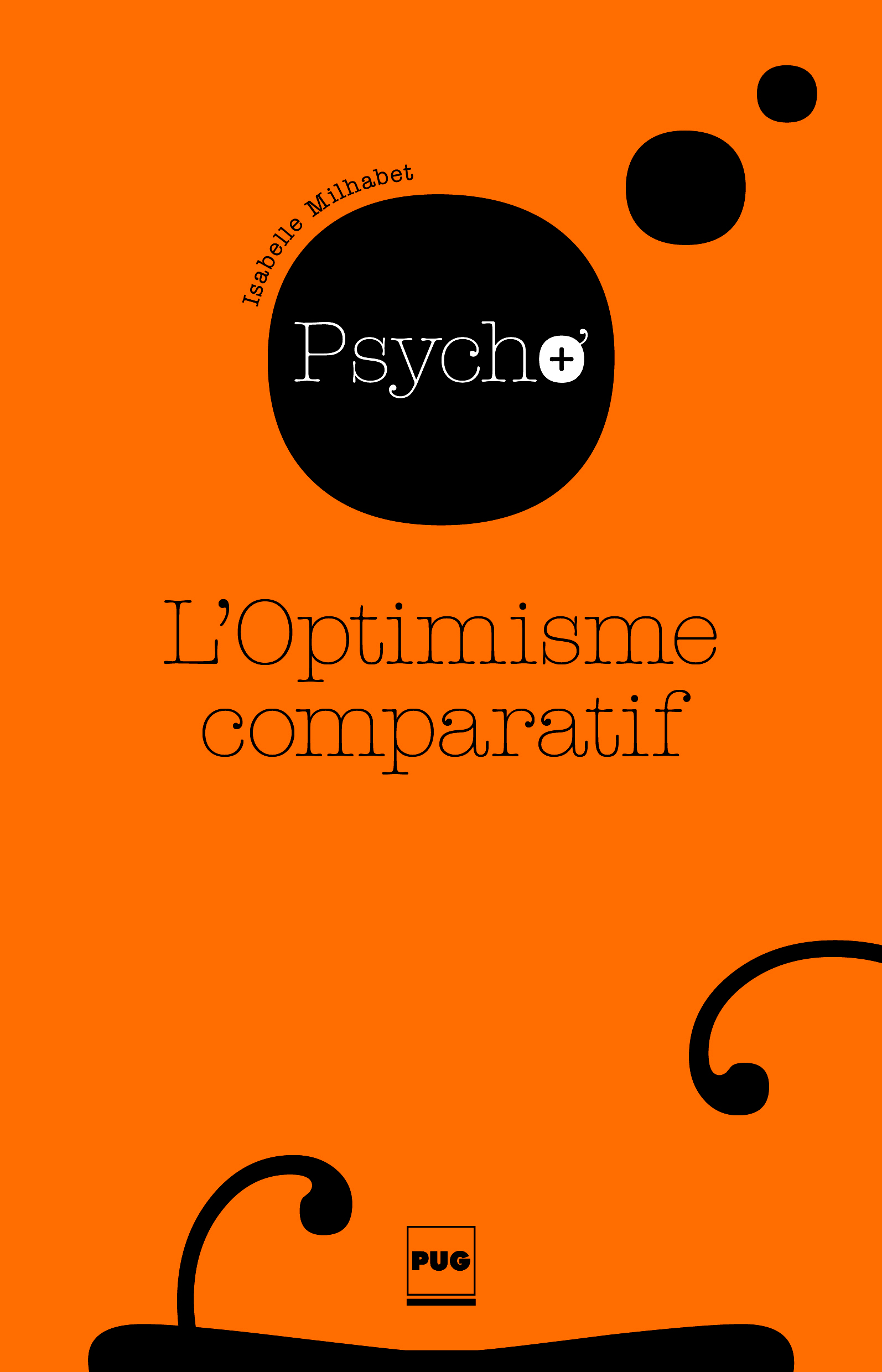 Couverture de l'ouvrage "Optimisme comparatif"